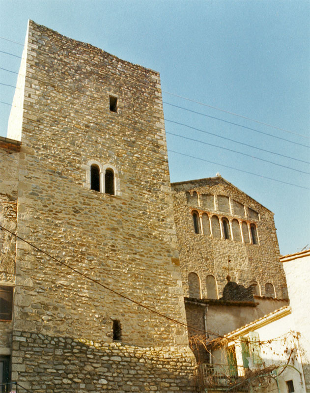 Abadia de Santa Maria d'Arles. Vallespir, França